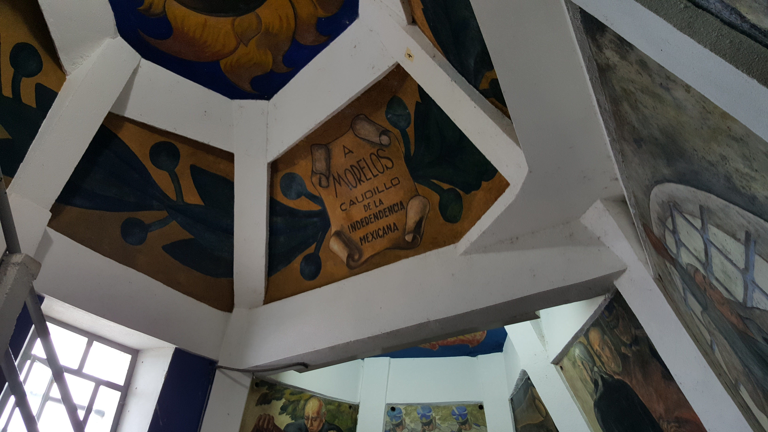 Interior Monumento a José María Morelos, Janitzio